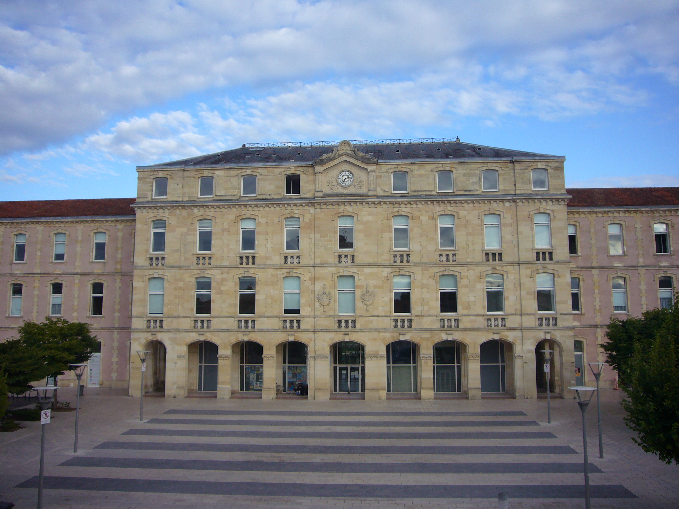 Hôpital des Enfants à Bordeaux, devenu aujourd'hui "Maison Internationale", Cours de l'Argonne, Bordeaux, France